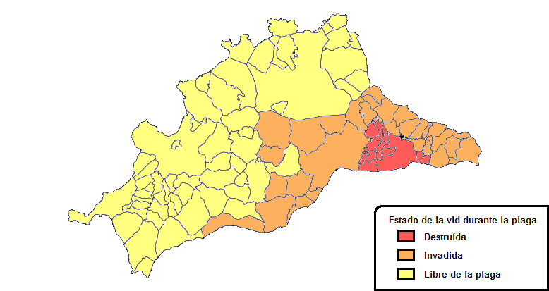 Expansión de la plaga de la fioxera en Málaga